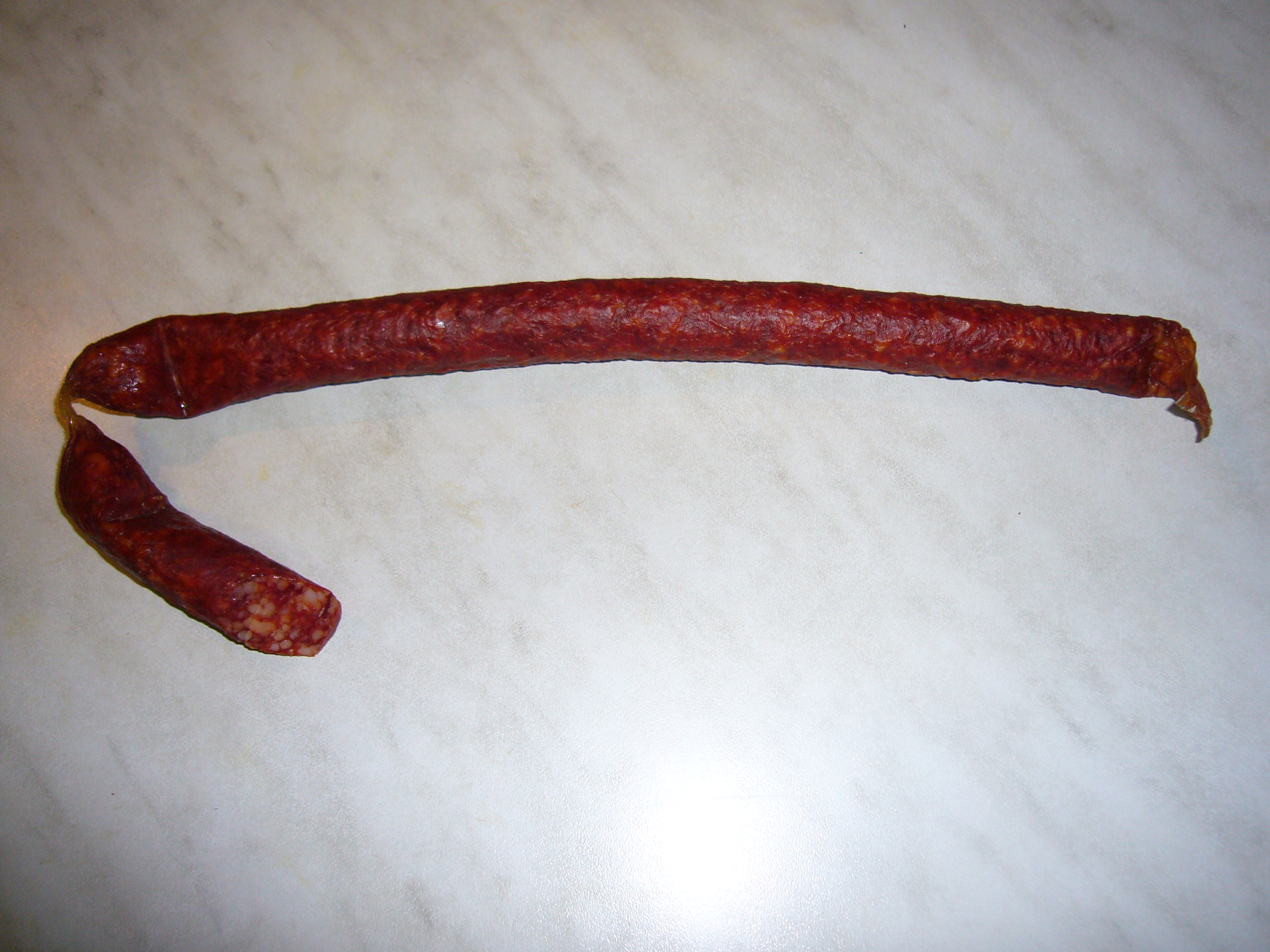 Typical Czech sausage - klobáska, or cigáro